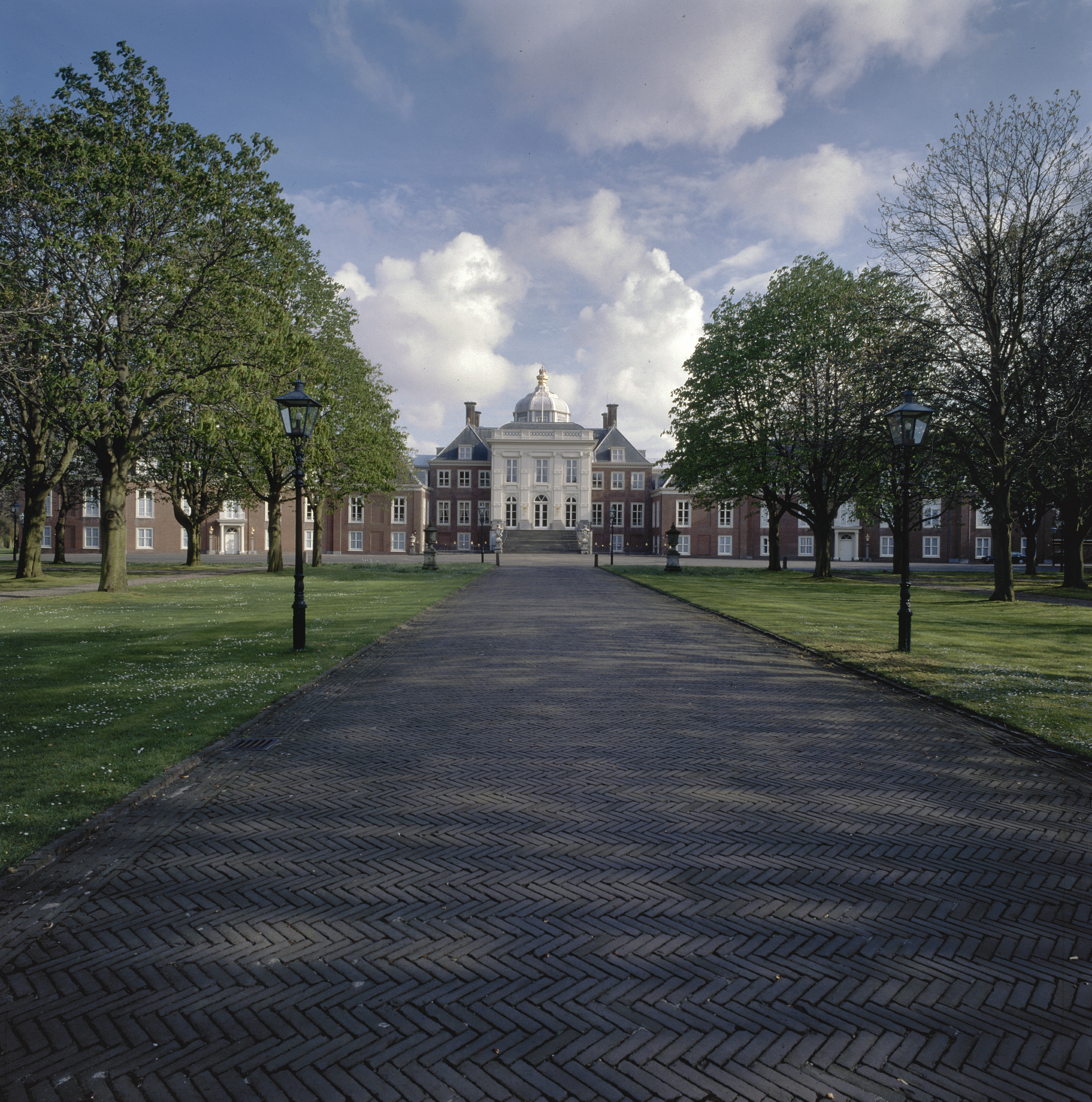 Huis ten Bosch: Overzicht voorgevel met gedeelte zijvleugels, vanaf de oprijlaan (opmerking: Gefotografeerd voor Kastelen en Buitenplaatsen in Zuid-Holland)